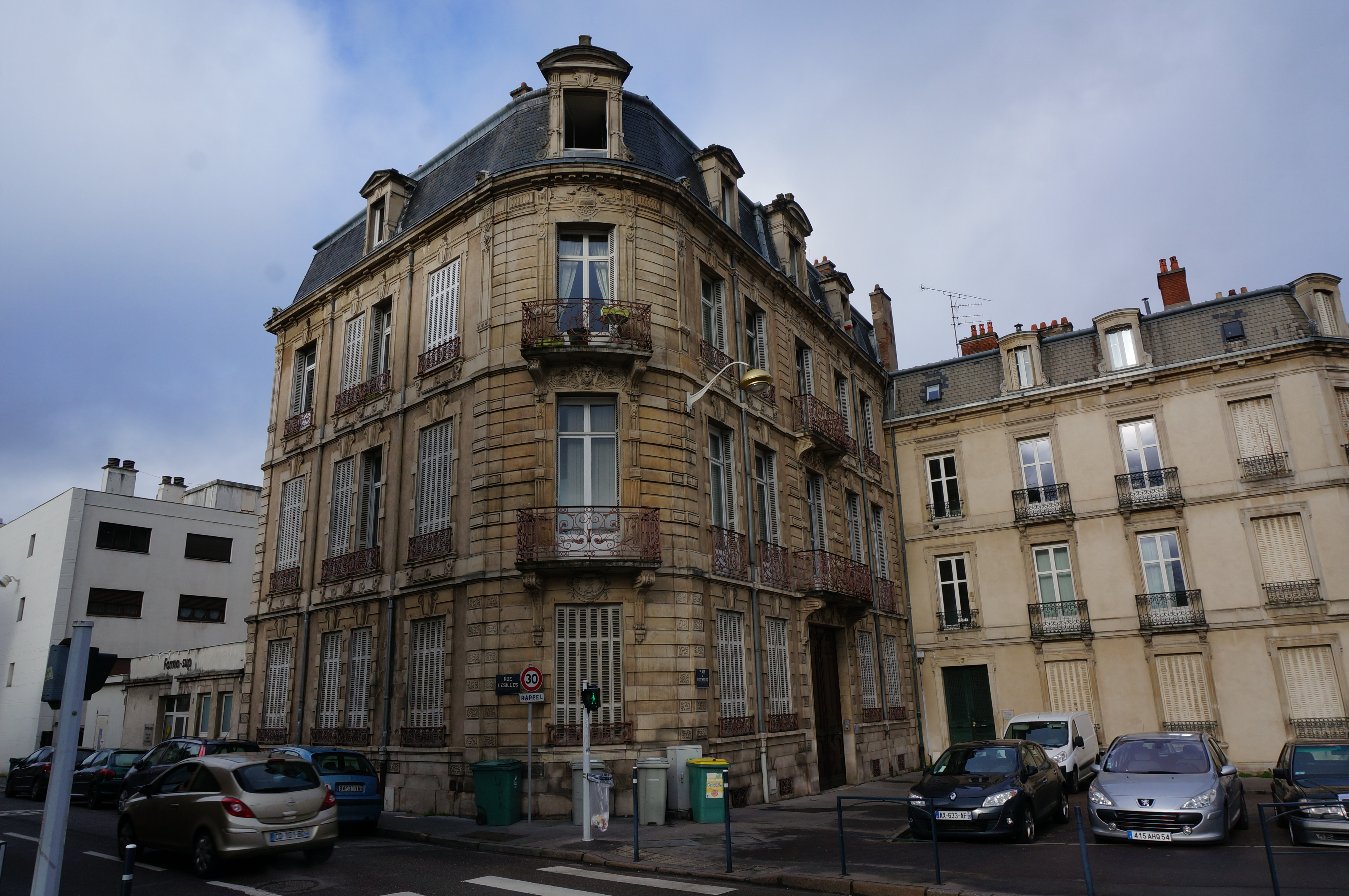 batiment de Nancy.